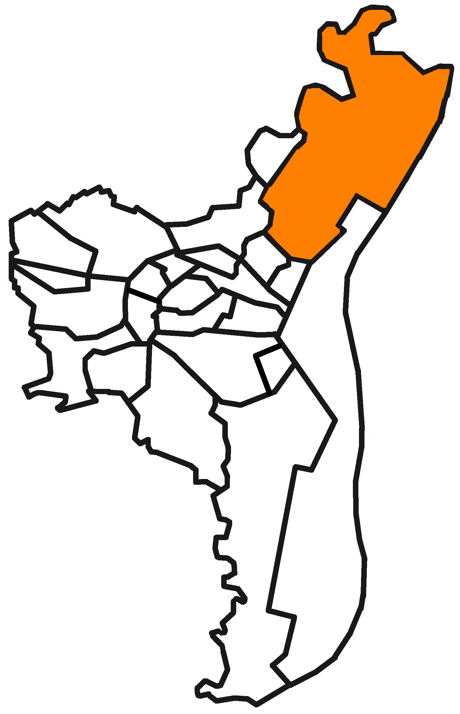 Localisation du quartier de la Robertsau à Strasbourg